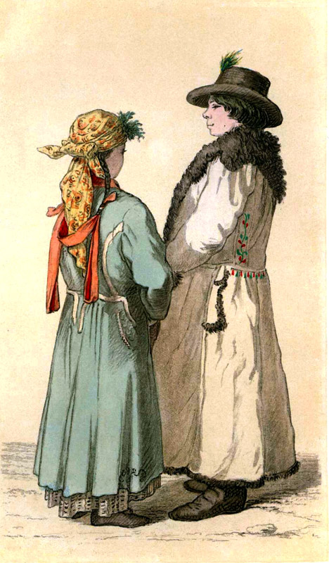 Rycina 4. Od Warszawy (Raszyn)